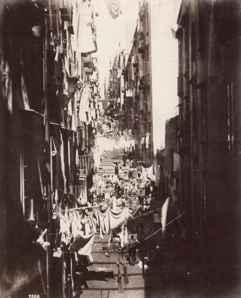 Giorgio Sommer (1834-1914) - Napoli, Pallonetto di Santa Lucia. Numero di catalogo: 2208.